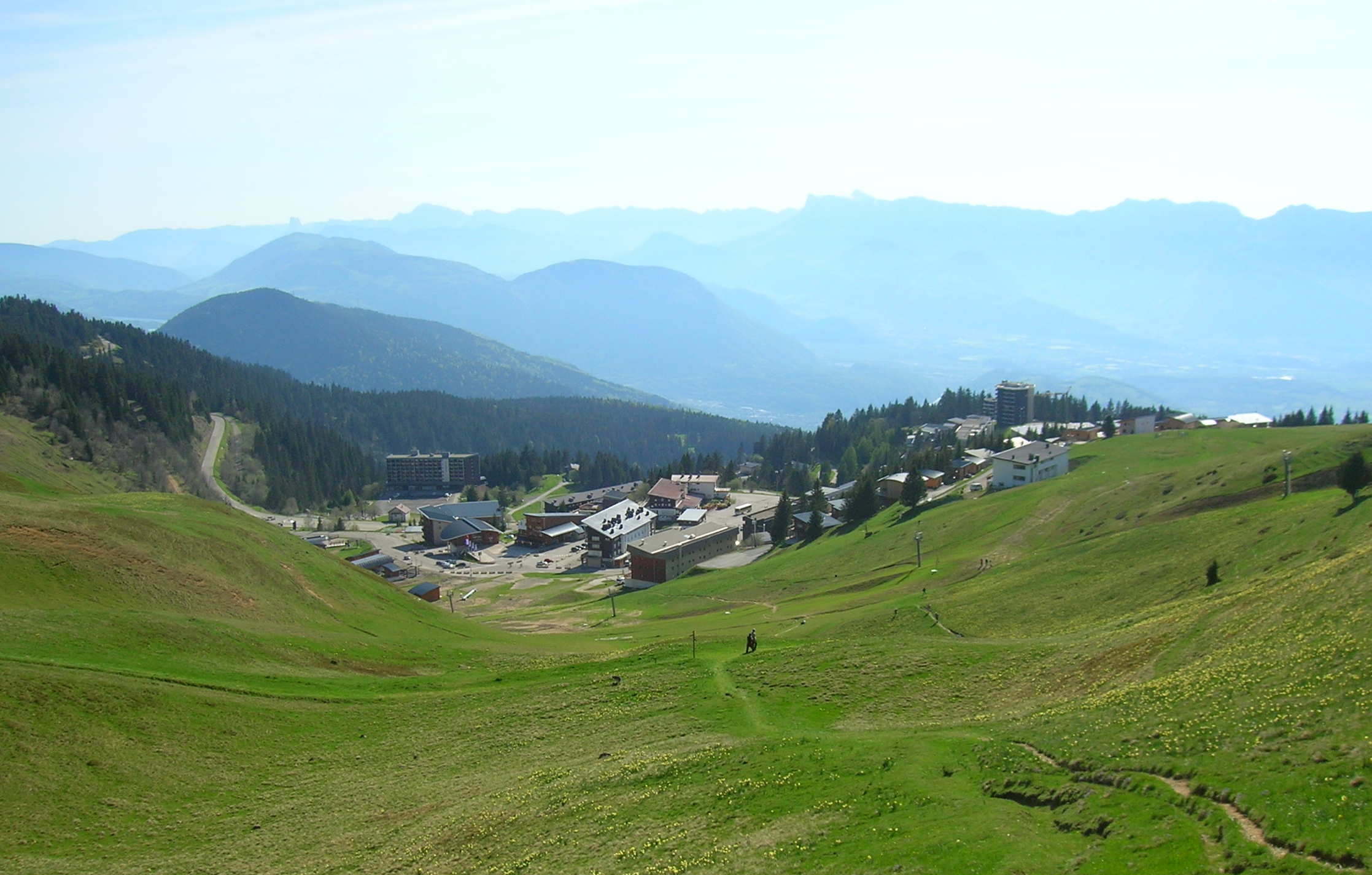 le Rocoin, Chamrousse. Narcissus pseudonarcissus fleuri.